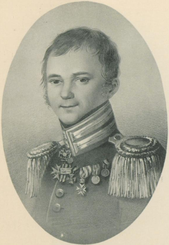 Глинка, Фёдор Николаевич (1786-1880), русский поэт, публицист, прозаик